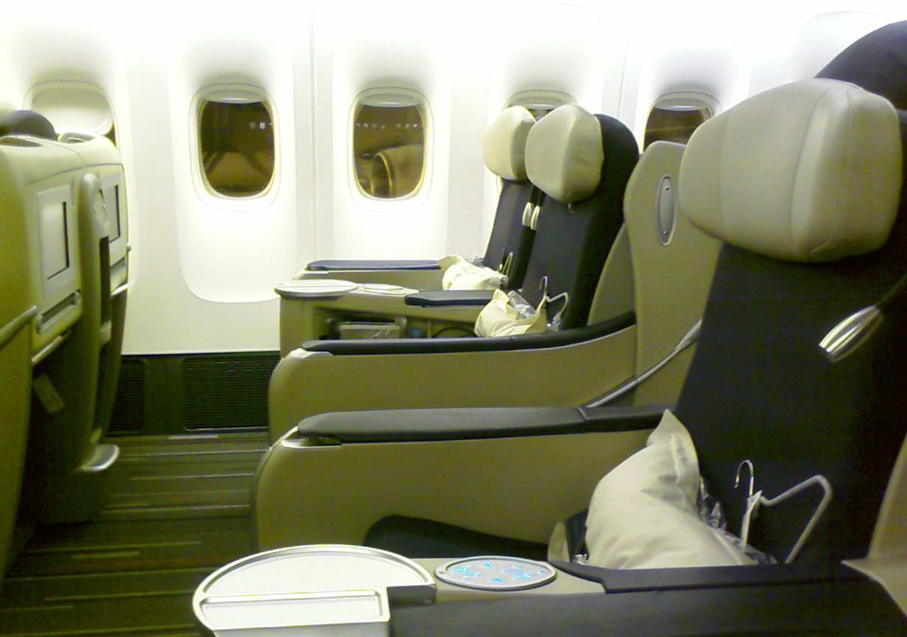 AF 777